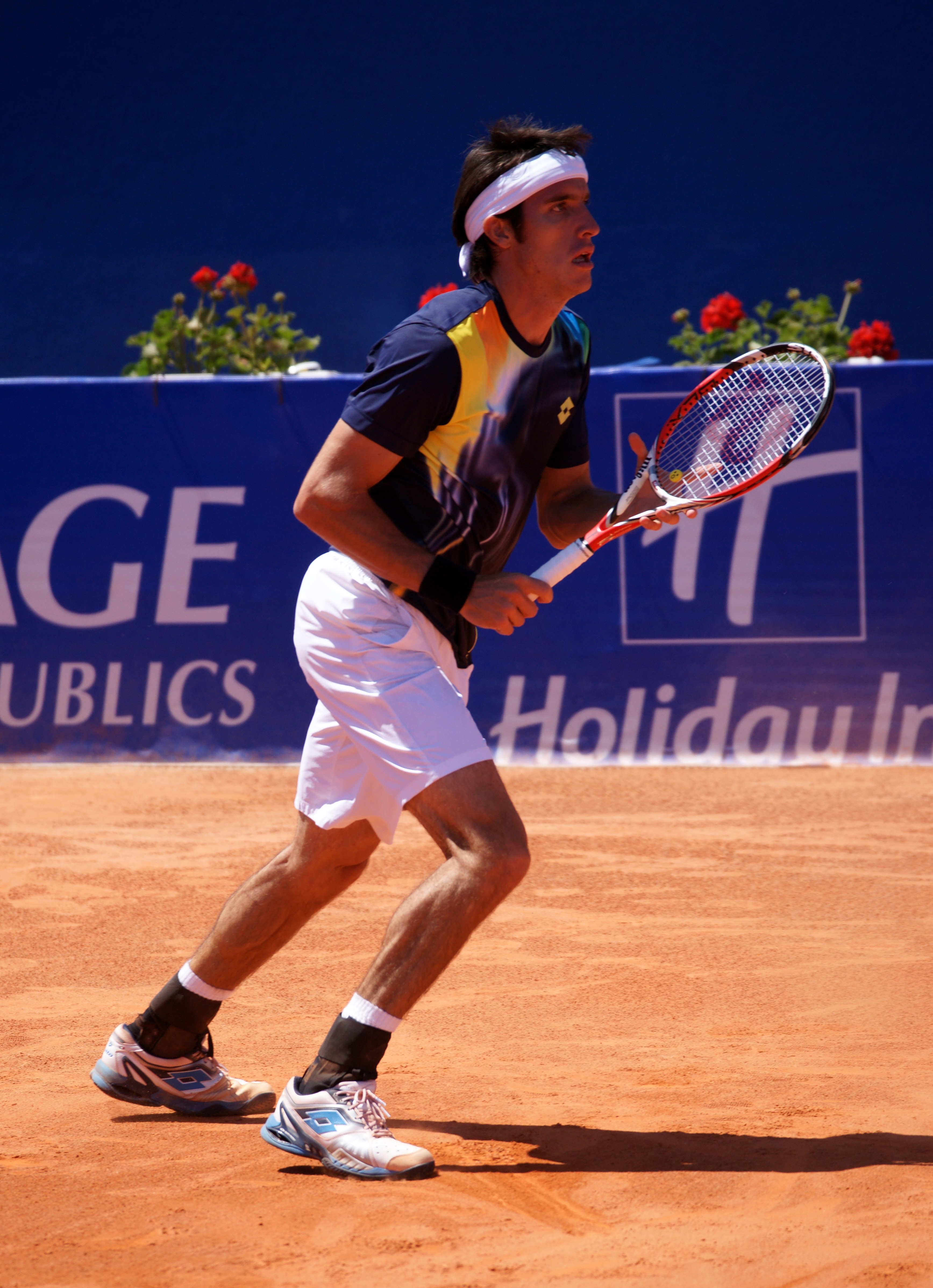 Leonardo Mayer Nice Open 2014